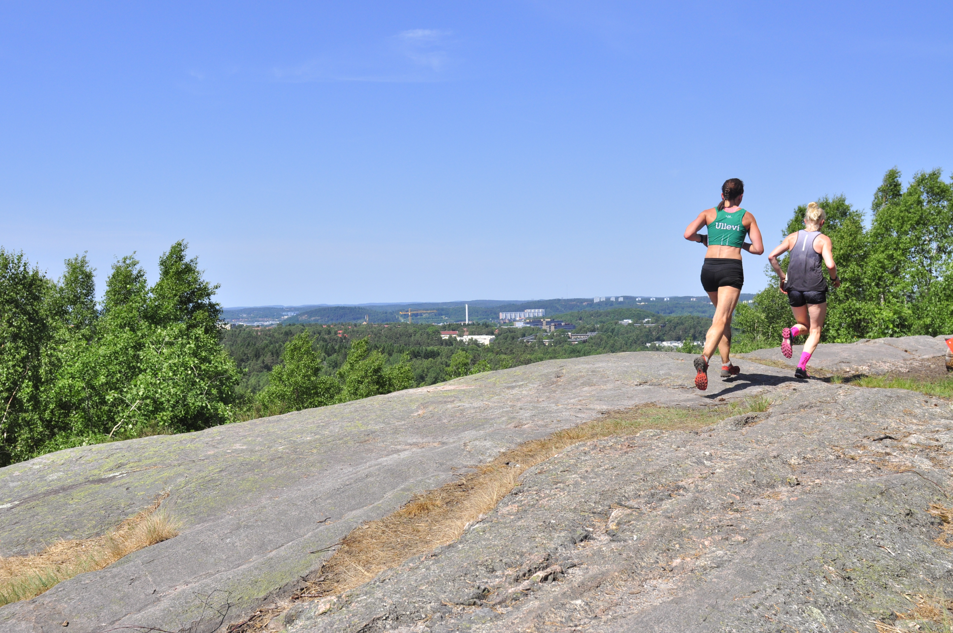 Segerduell på Getryggen med utsikt över Göteborg i Skatås ryggar